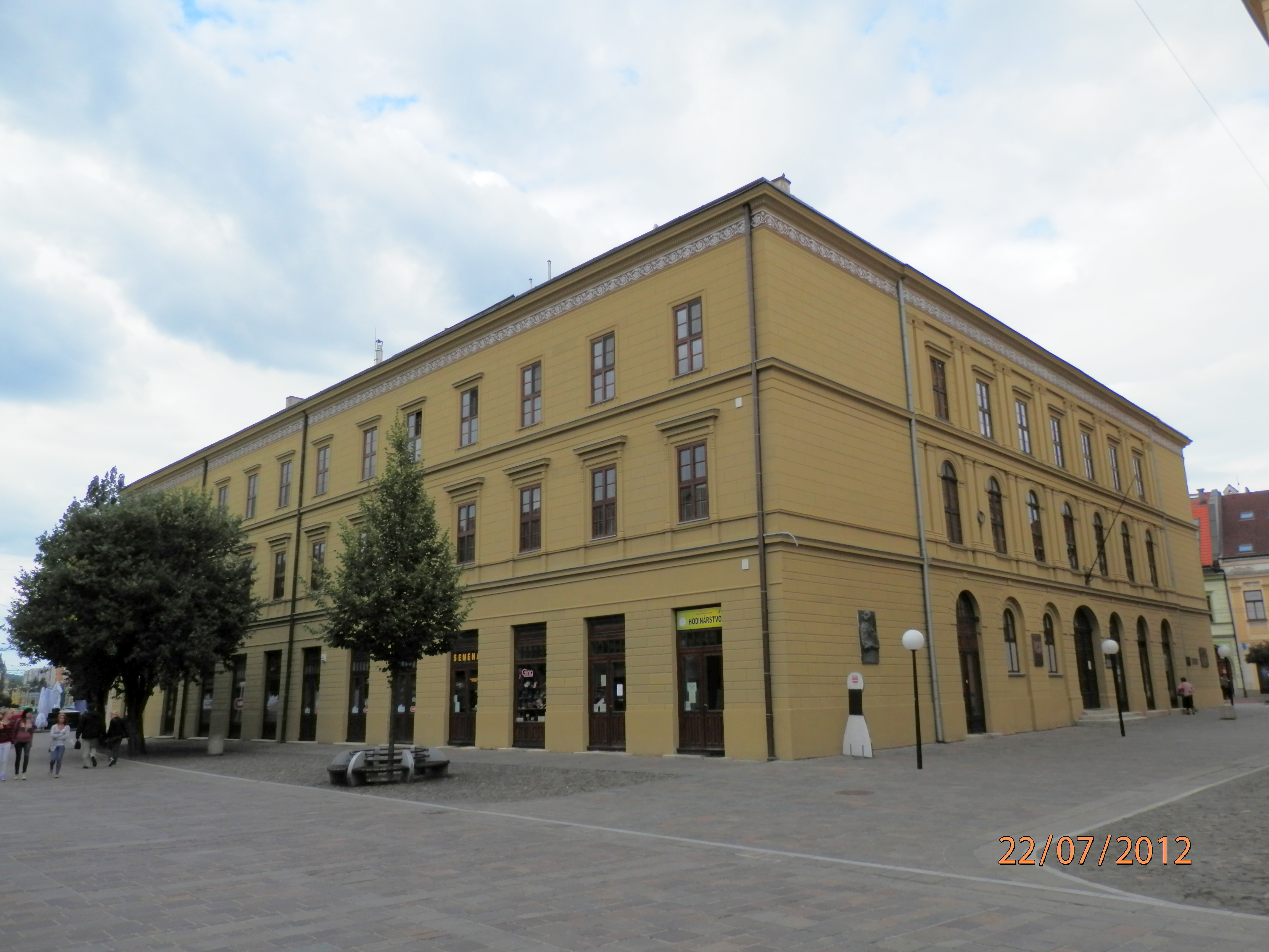 Historické centrum mesta Prešov.